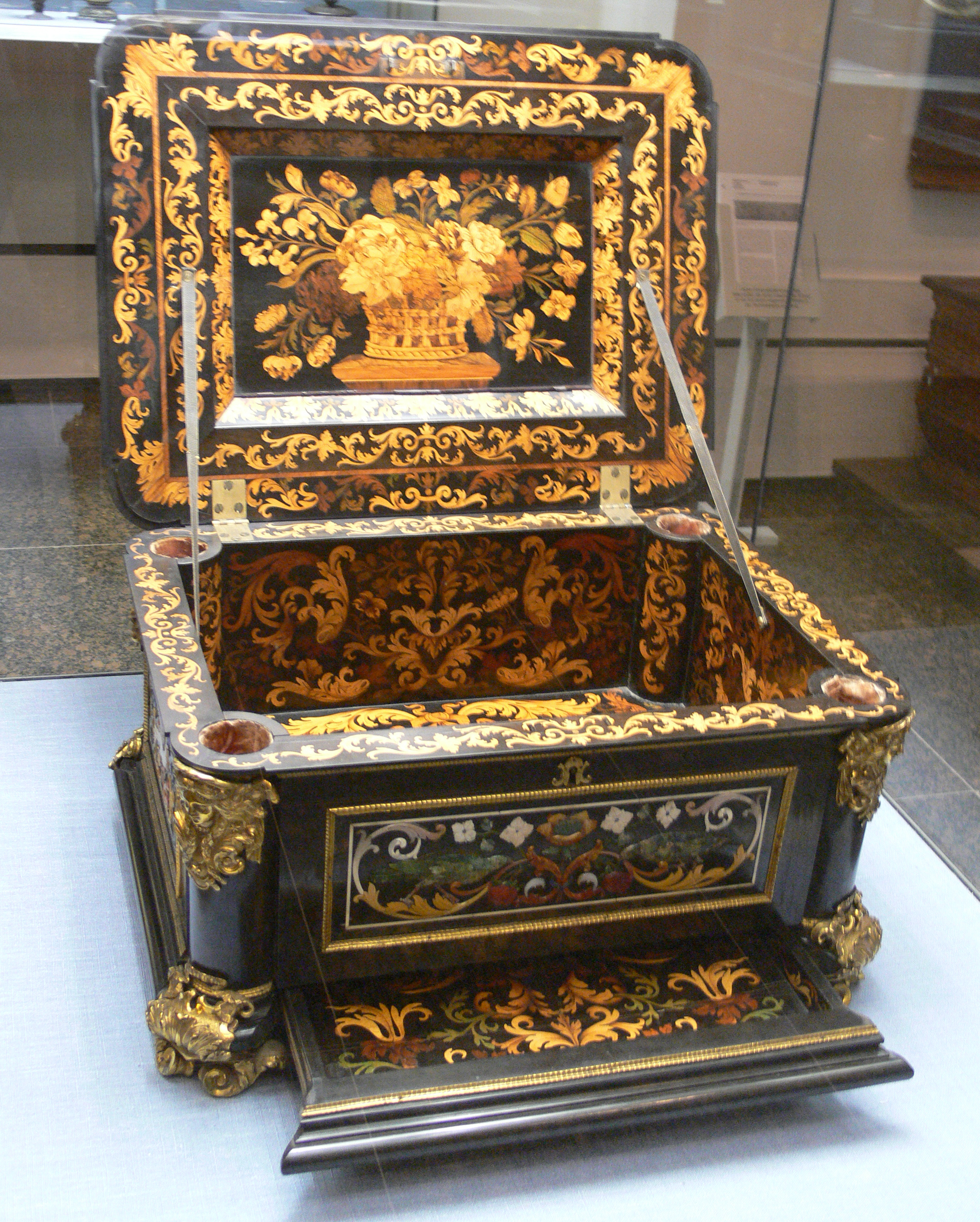 Kassette für Spezereien; Ebenholz mit Holzintarsia, Pietra dura und Bronzebeschlägen; Florenz, Hofwerkstätte in den Uffizien (Holzintarsien von Leonarde van der Vinne?), um 1690/1695 Kunstgewerbemuseum Berlin, Inv. Nr. 97,9